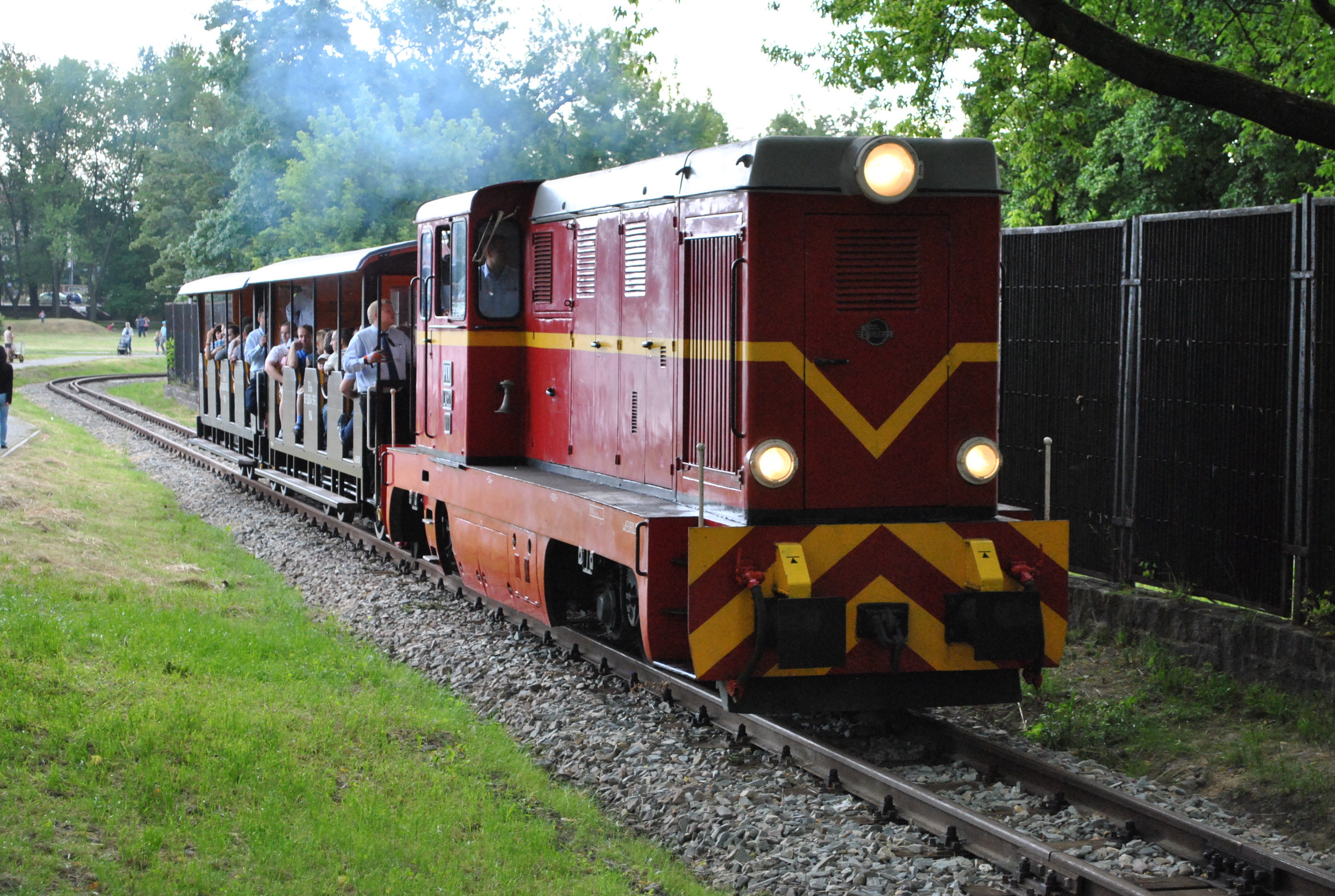 Kolej parkowa w Parku Śląskim. Skład ciągnięty przez lokomotywę Lxd2 w kierunku stacji Zoo